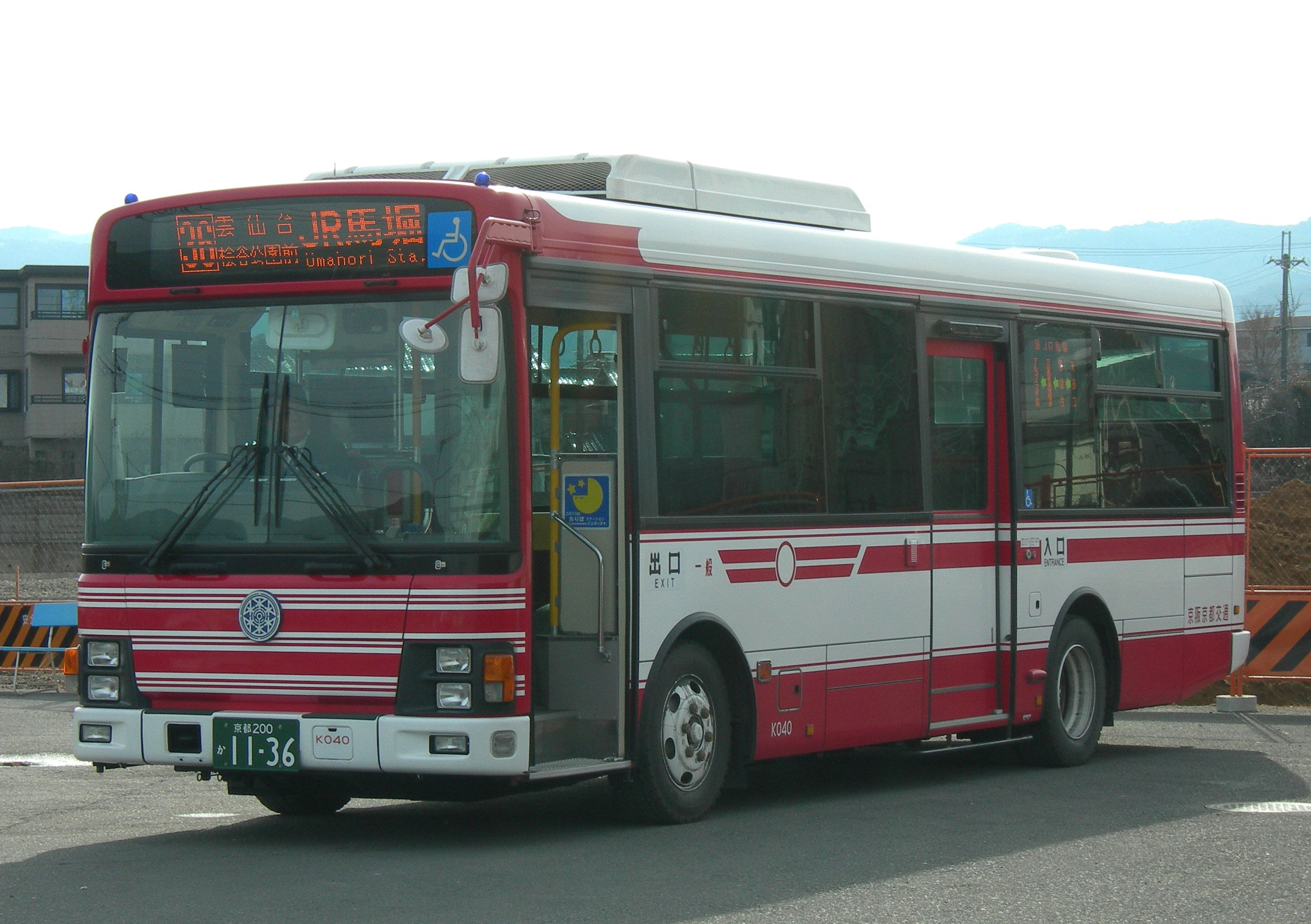 京阪京都交通 路線バス